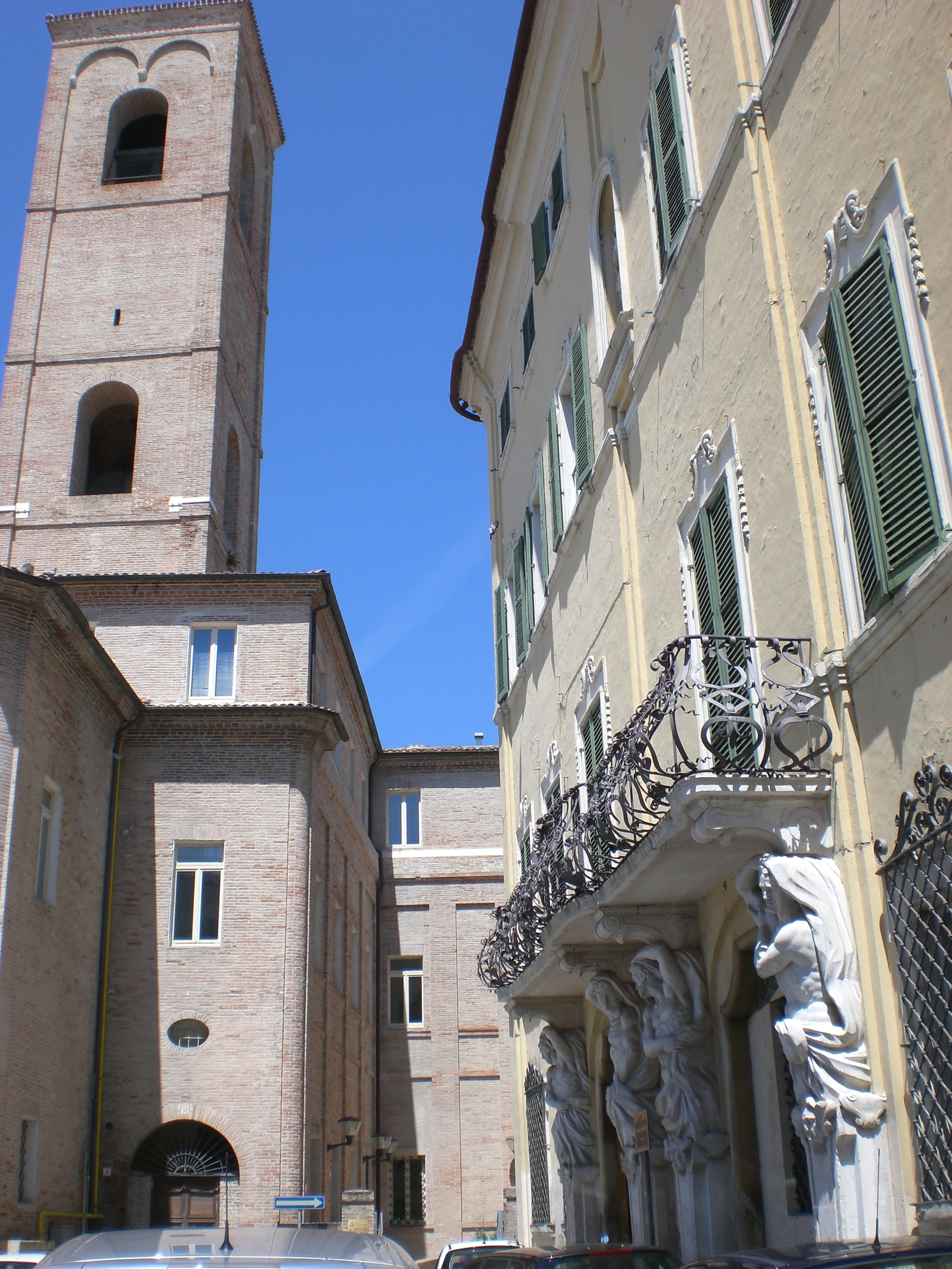 Jesi, Piazza Federico II, Palazzo Balleani, XVIII secolo